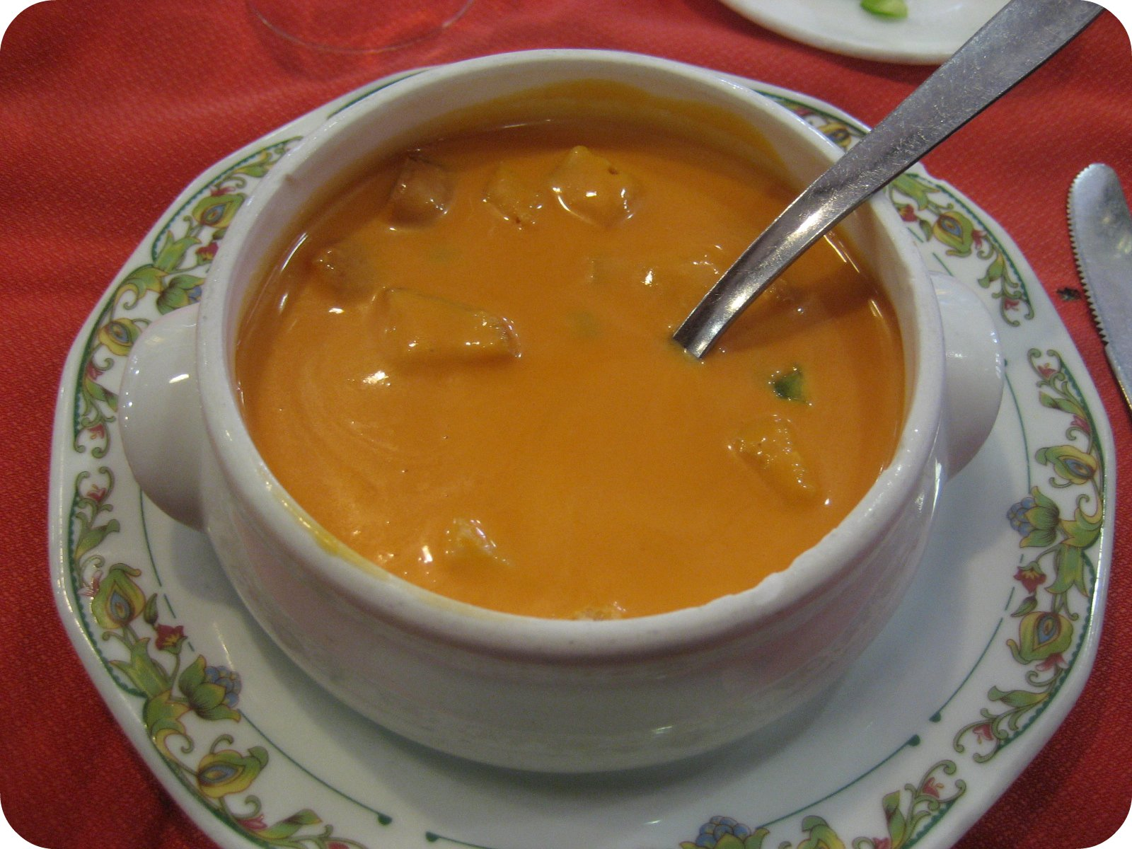 Tazón de gazpacho, servido en un restaurante de Granada.